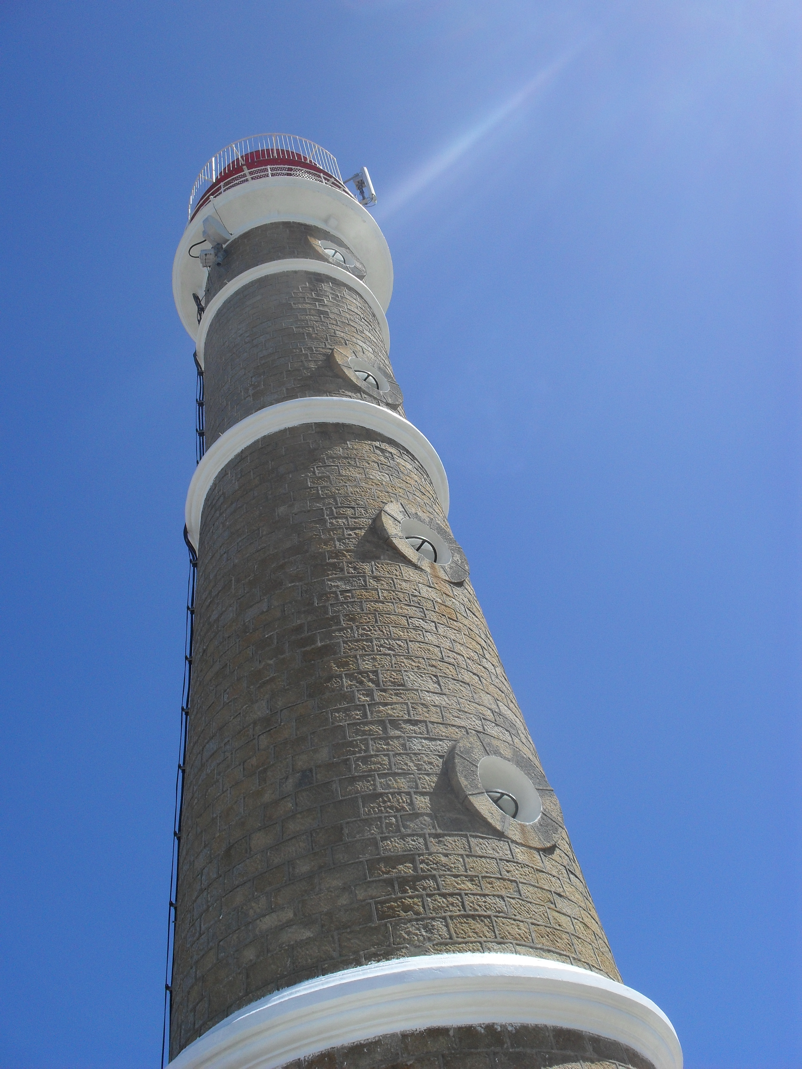 Faro de Cabo Polonio. Ubicado en Cabo Polonio, Departamento de Rocha